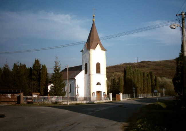 Church Mena Panny Marie - Dubinne(Slovakia)